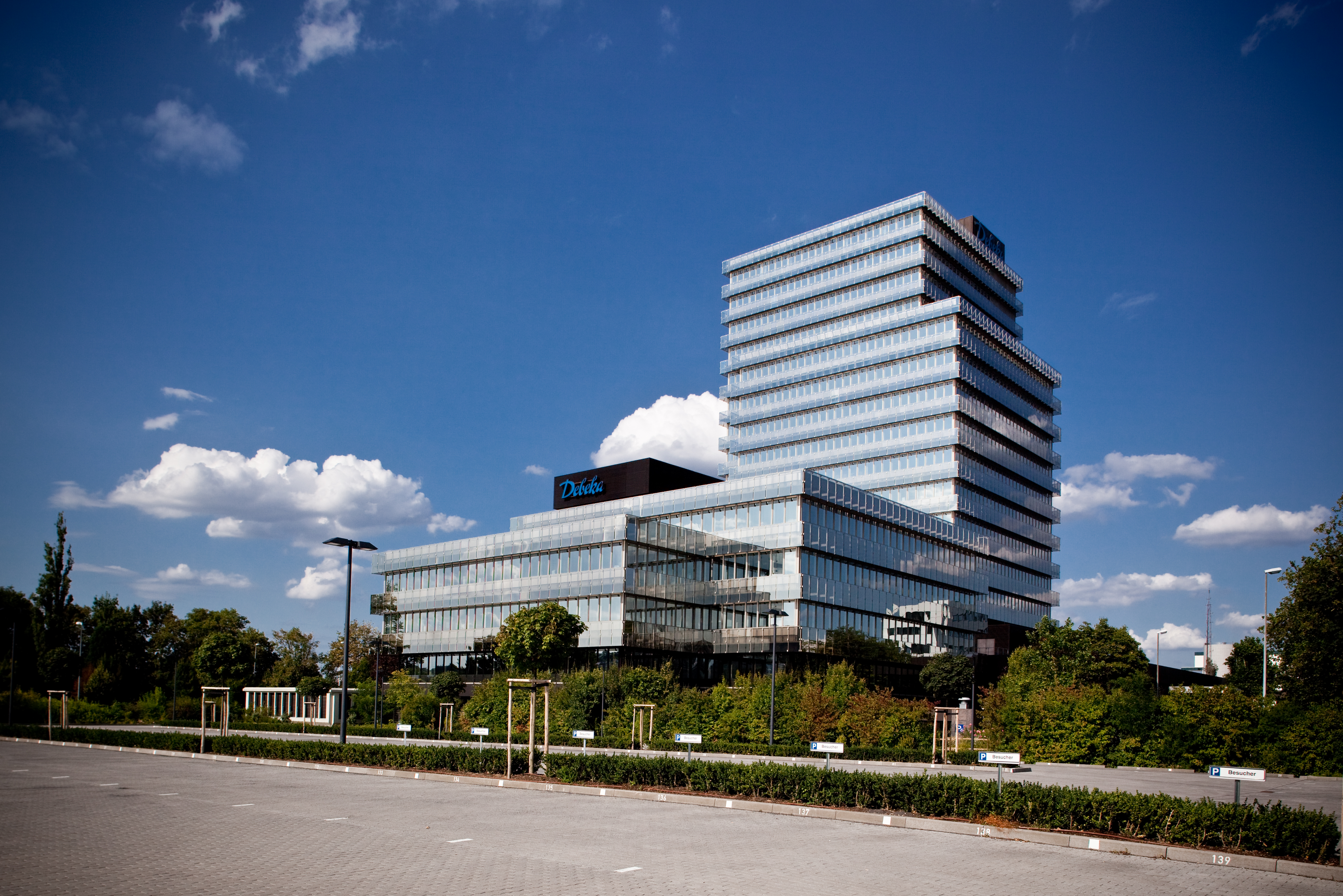 Aufnahme der Debeka-Hauptverwaltung in Koblenz